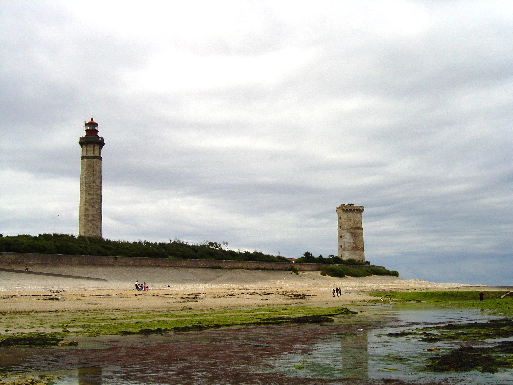 Lüchtfüer un Lüchttoorn op Ré dat Bild heff ick inn Junimaand 2004 sülmst mookt